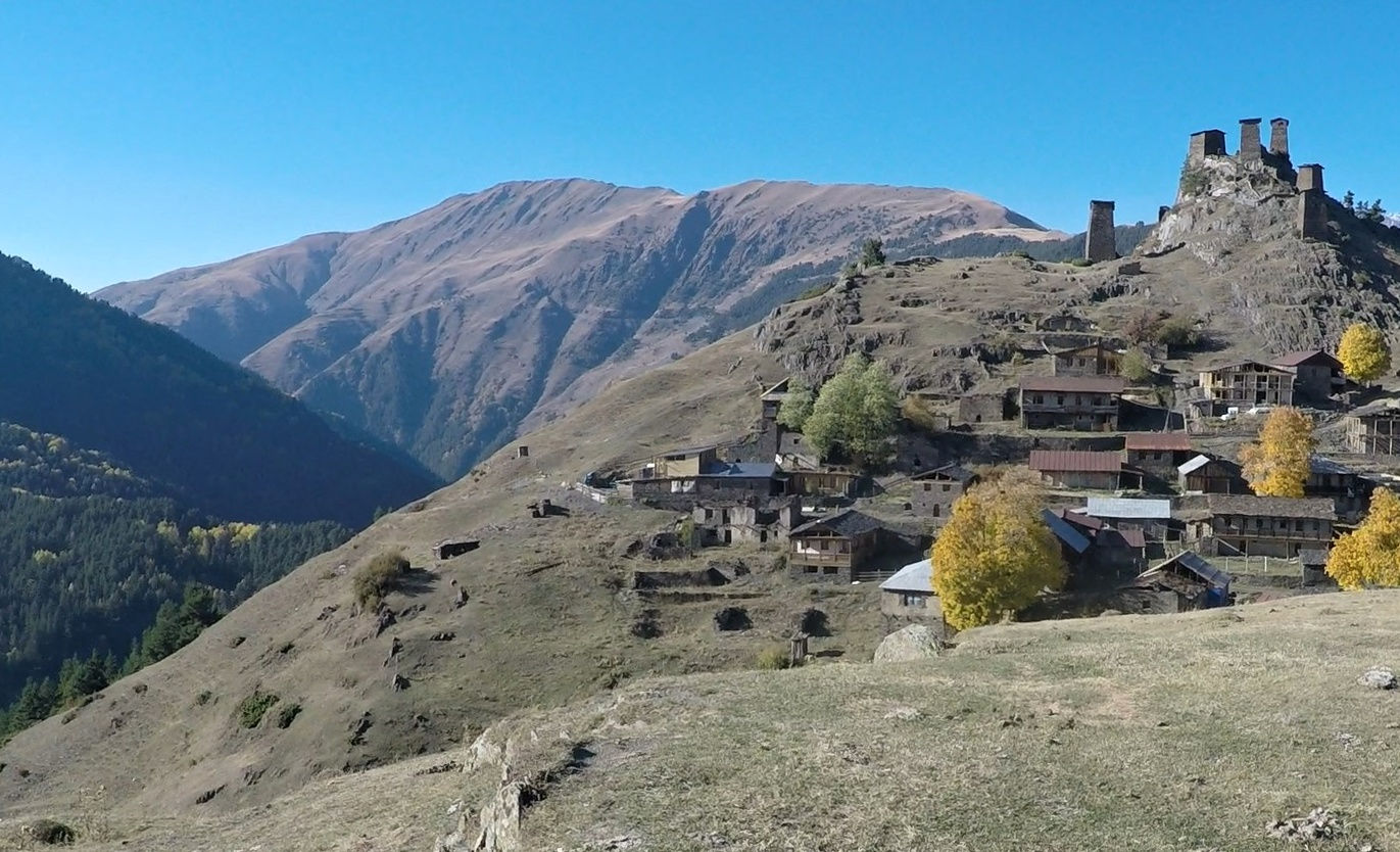 Horní Omalo vpravo, hřbet Makratela v pozadí vlevo